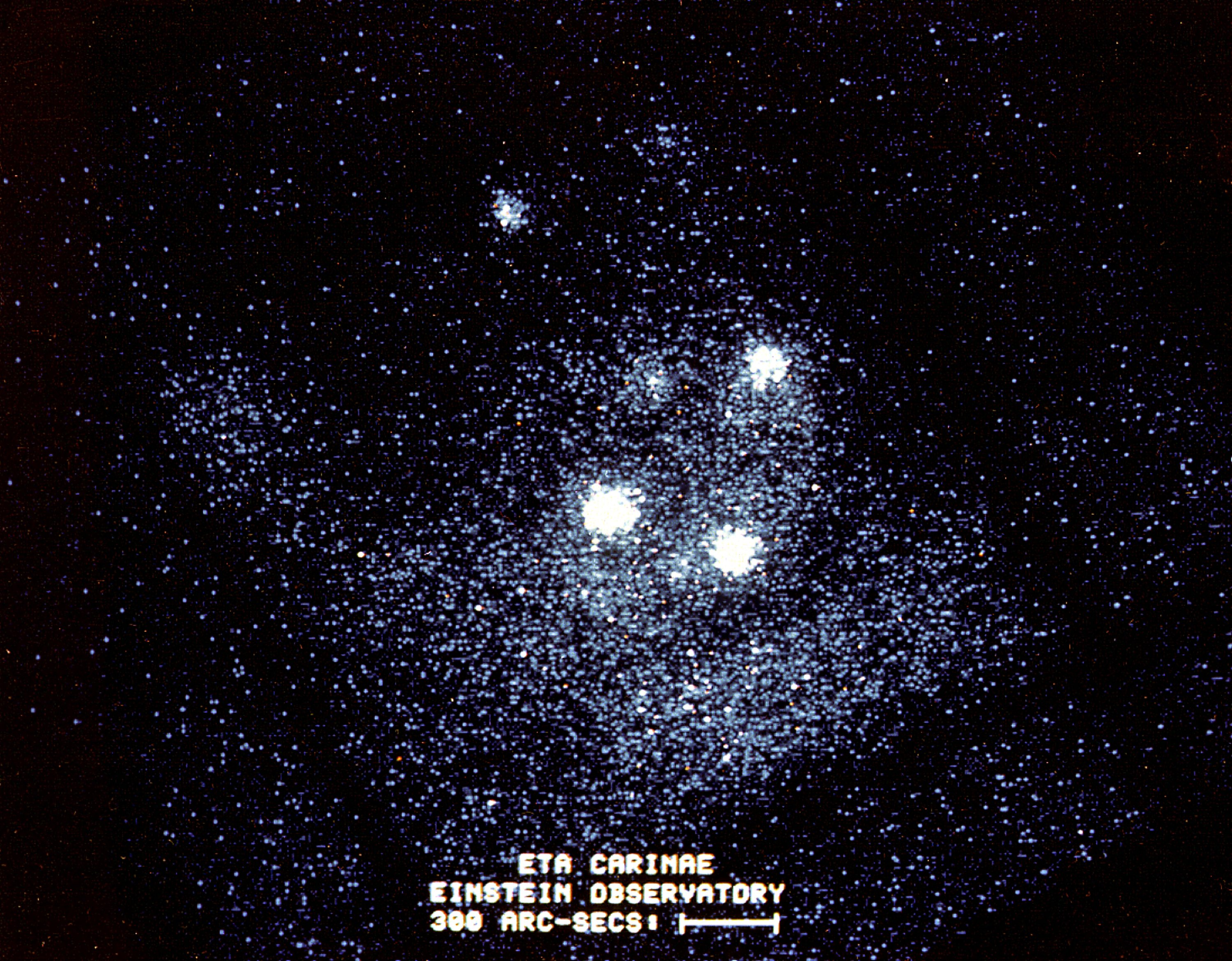 La nebulosa della Carena vista ai raggi X